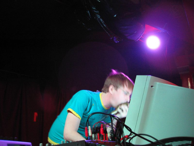 Machine Drum live au Chop Suey de Seattle pour le festival Decibel 2005